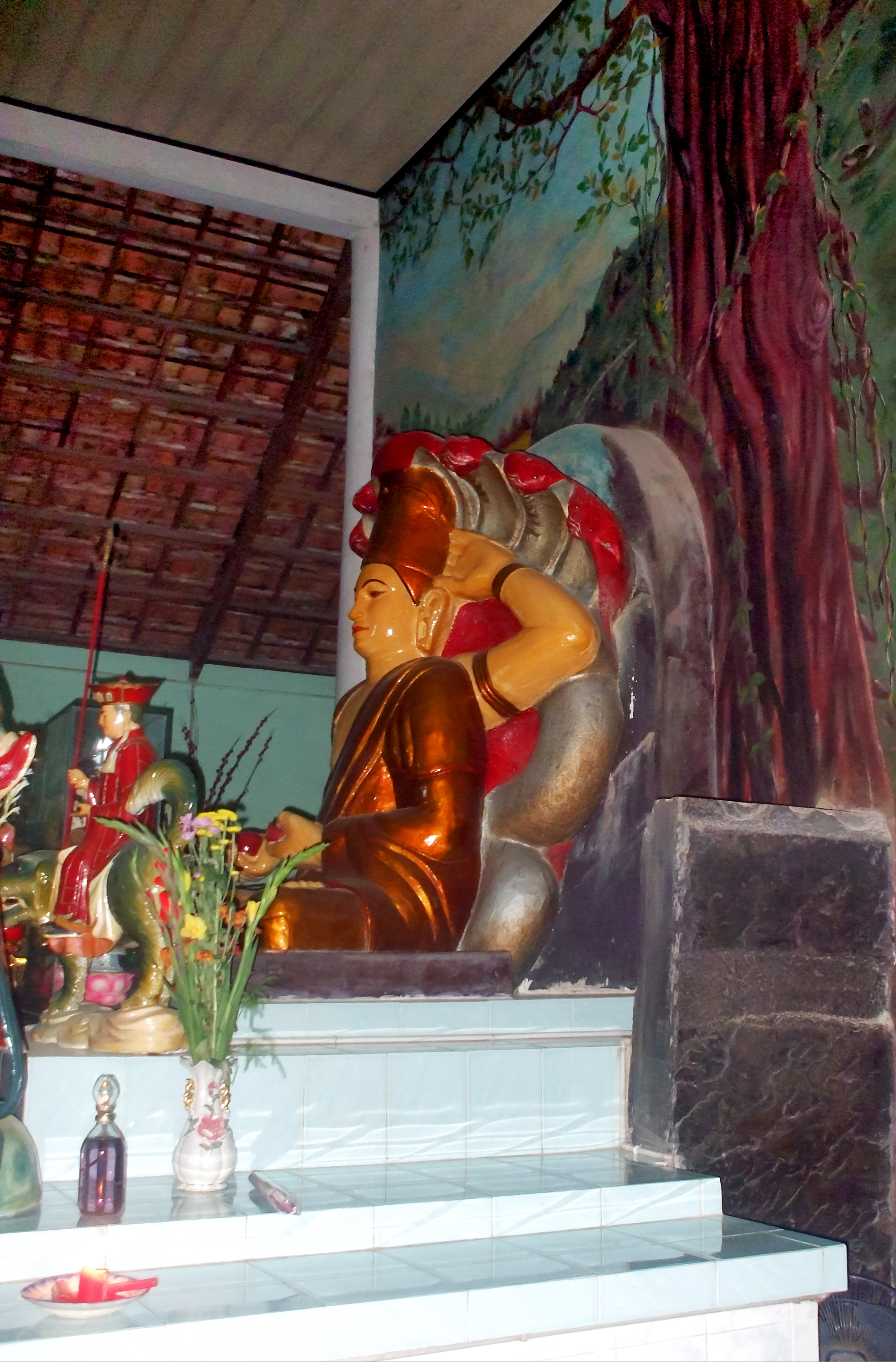 Tượng Phật bốn tay và tấm bia đá cổ có từ thời vương quốc Phù Nam, hiện ở trong chùa Linh Sơn (Ba Thê); tọa lạc tại thị trấn Óc Eo, huyện Thoại Sơn, tỉnh An Giang, Việt Nam.